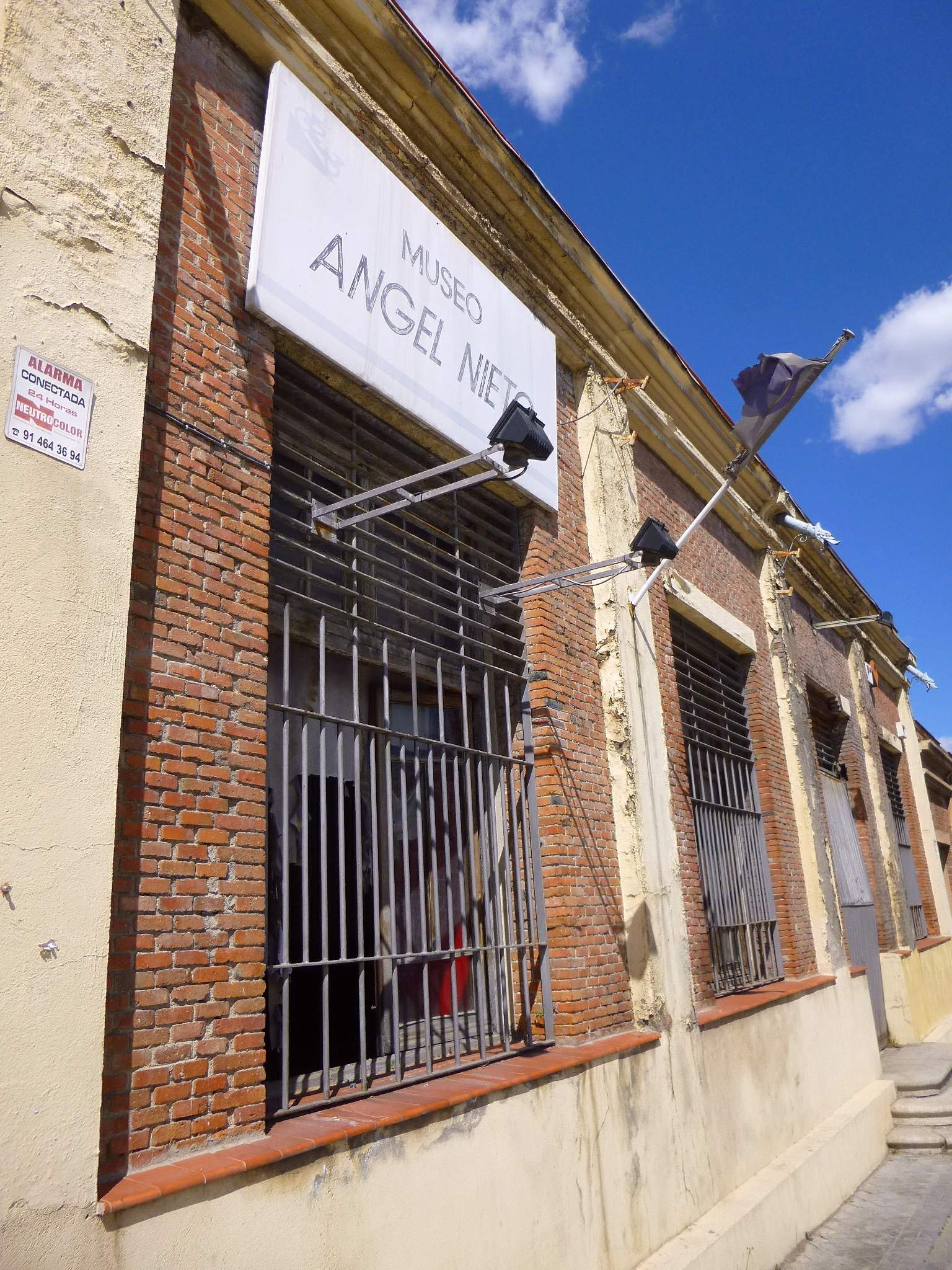 El abandonado Museo Ángel Nieto de Madrid